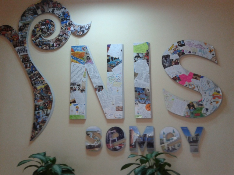 НЗМ Семей қаласы